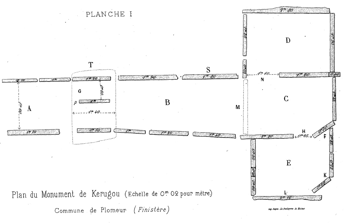 Plomeur : plan du dolmen de Kerugou, dessiné par Paul du Chatellier qui l'a fouillé en 1876